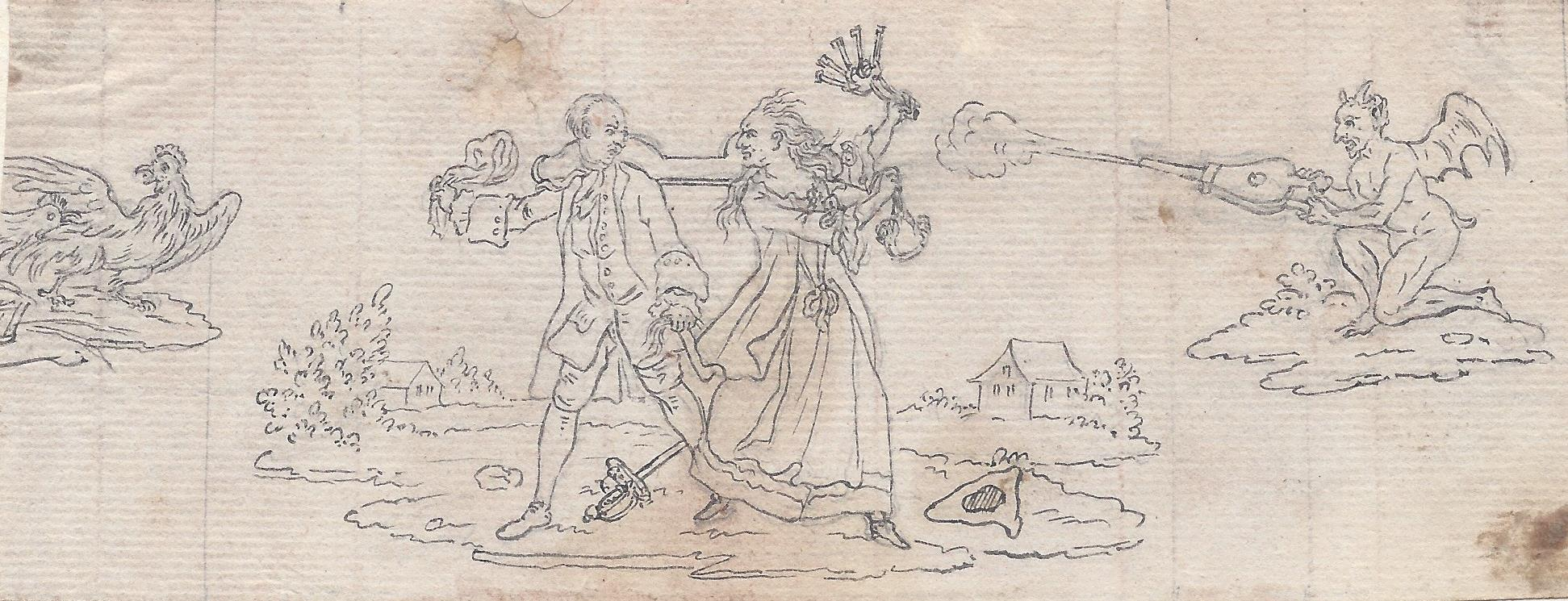 Johann David Nessenthaler (1717-1766) Allegorie der häuslichen Schlüsselgewalt. Durchgepauste Tuschzeichnung(Verso Rötel) um 1750.